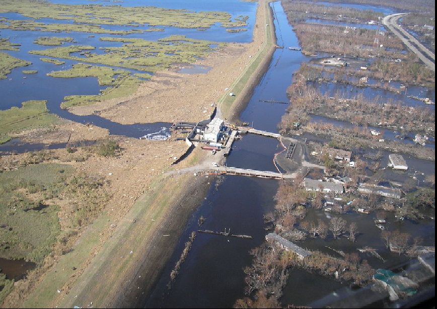 Cebuano: Nairn, Louisiana